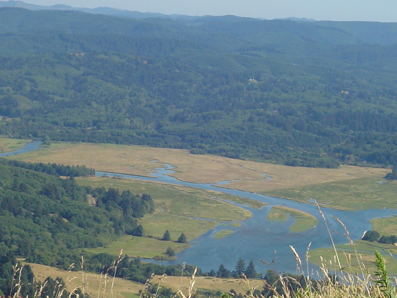 Salmon River in Oregon